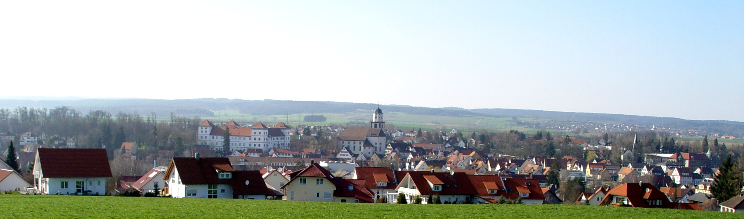 Meßkirch von Süden gesehen